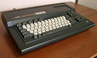 Yamaha YIS503II Personal computer